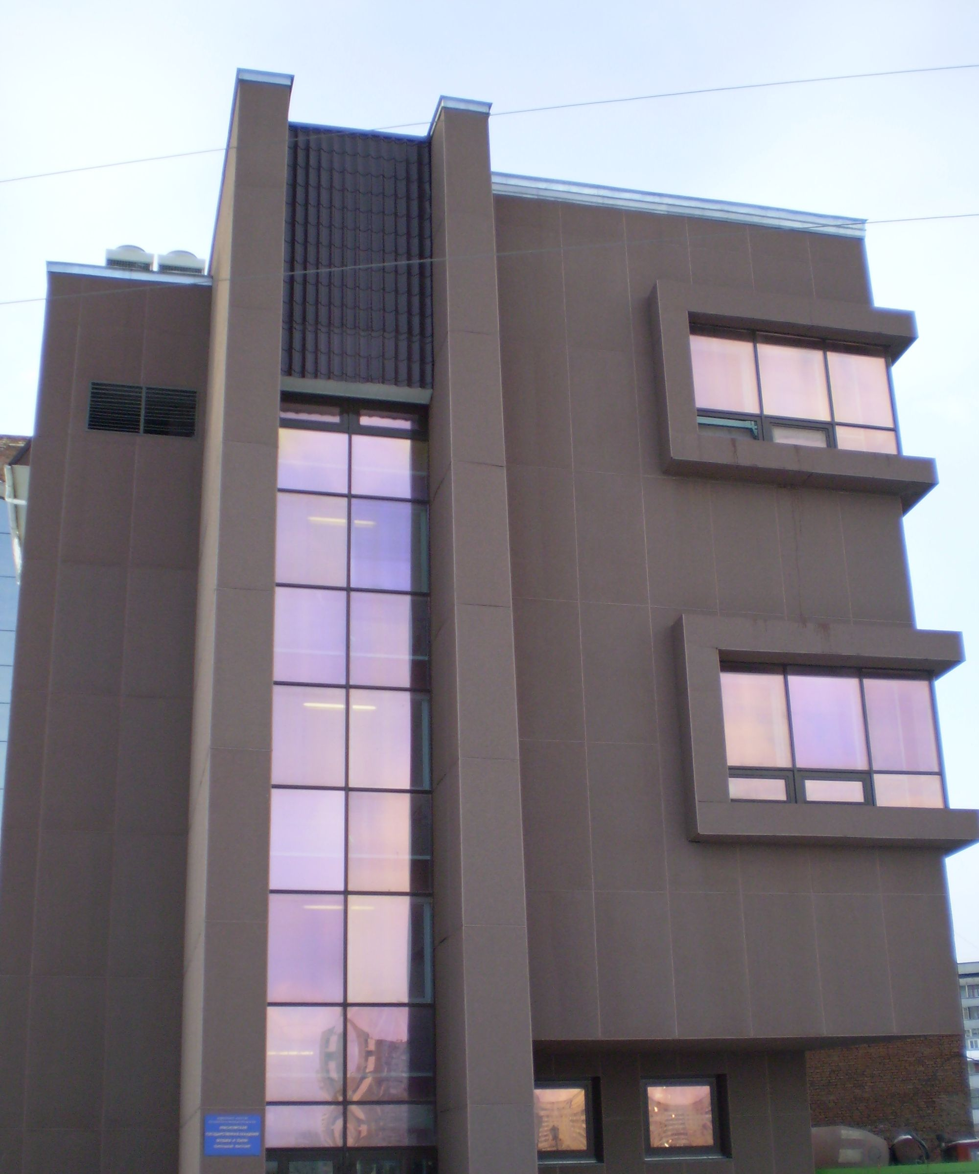 Красноярская государственная академия музыки и театра